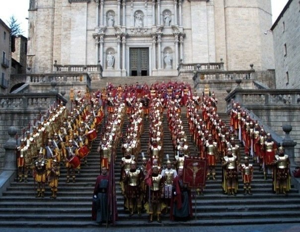 Maniple de Manaies de Girona.